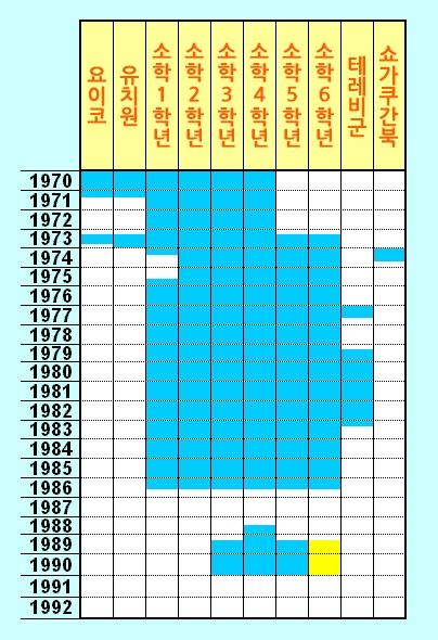 도라에몽의 학습 잡지 연재도이다.